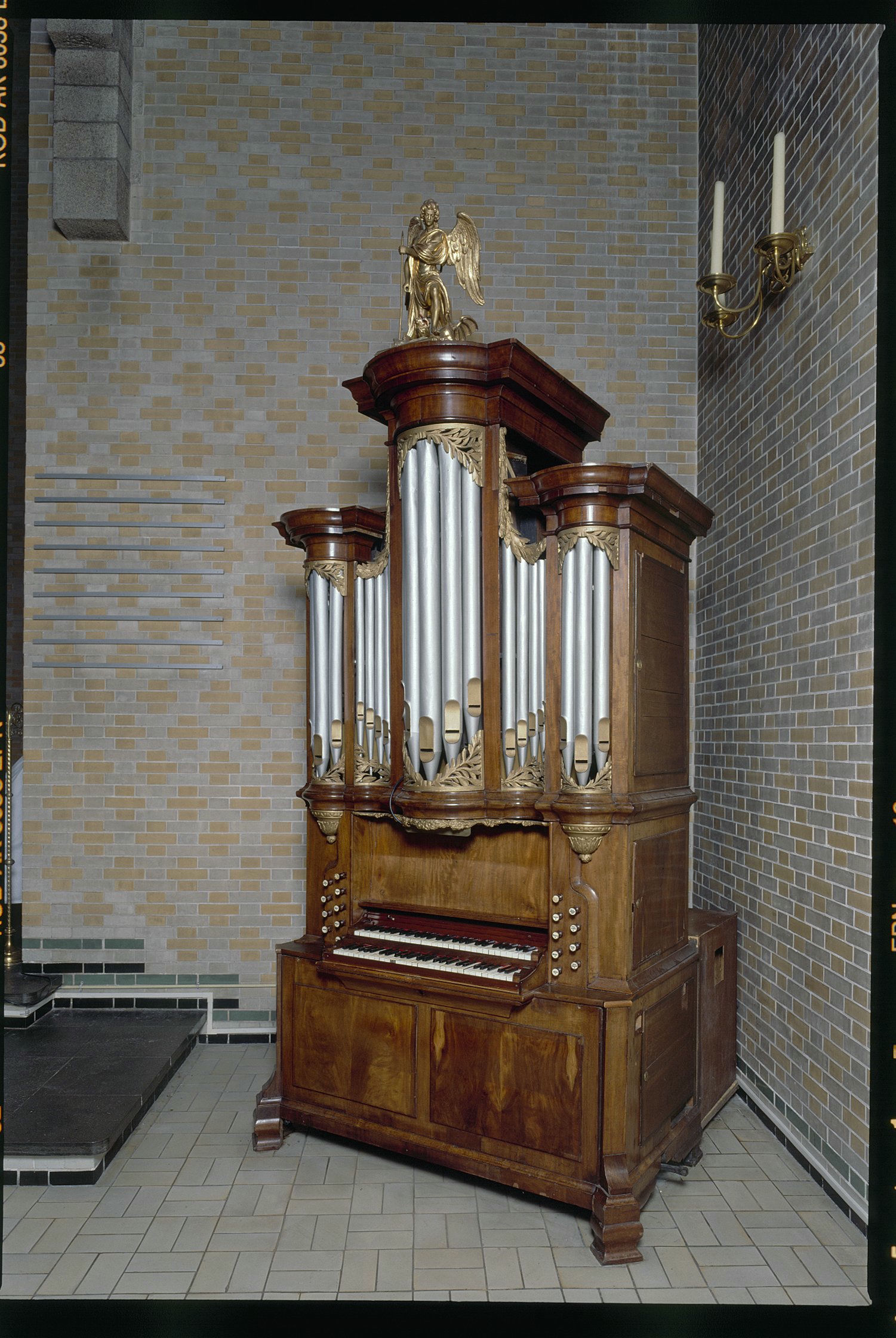 Oud-katholieke kerk van de Heiligen Anna en Maria: Interieur, aanzicht orgel (opmerking: Gefotografeerd voor Het Historische Orgel in Nederland 1769-1790)